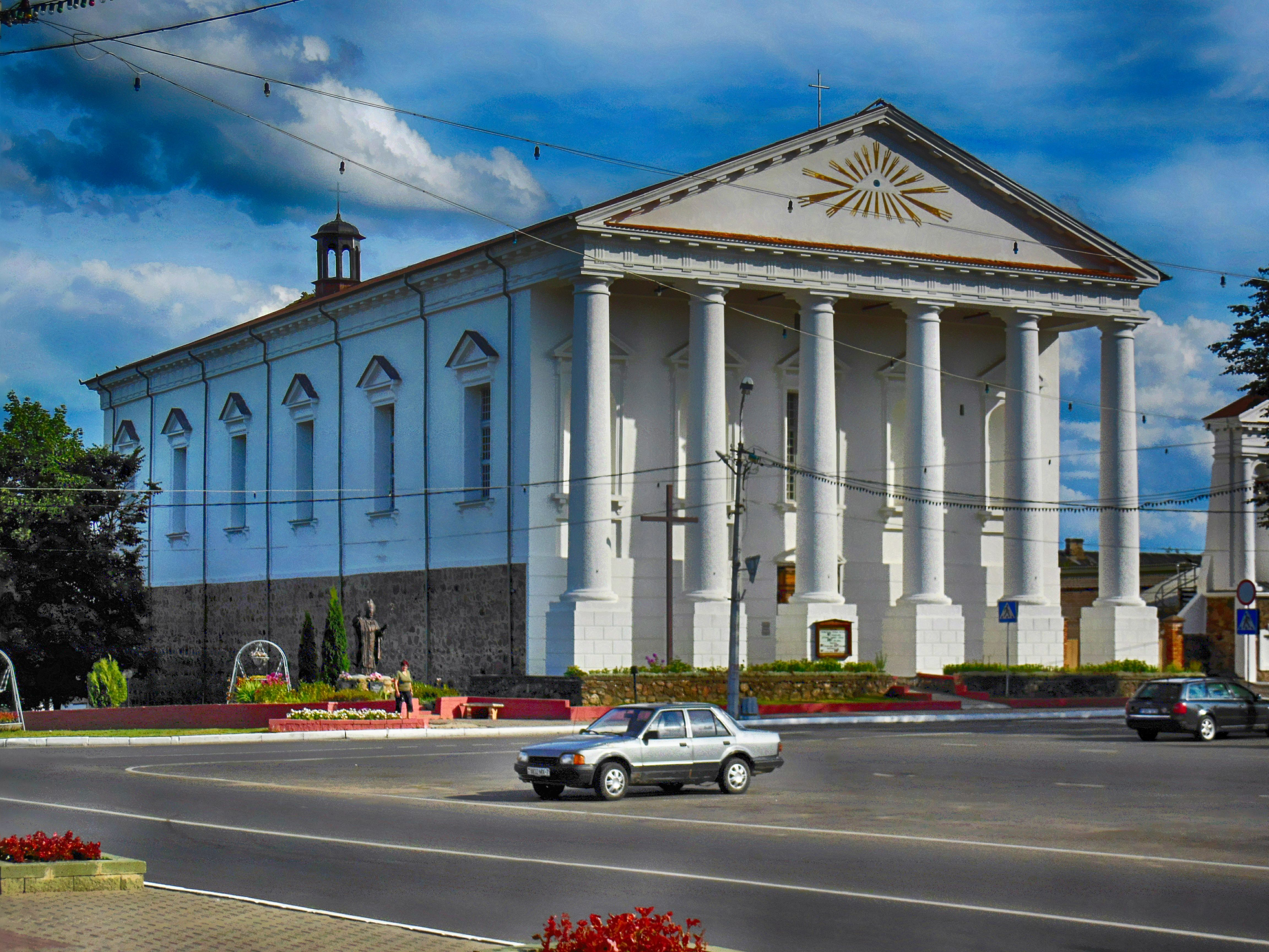 Беларуская (тарашкевіца): Касьцёл Сьв. Юзафа з брамай-званіцай. г. Валожын This is a photo of Belarusian heritage monument. Reference number: 612Г000073 ( WLM)